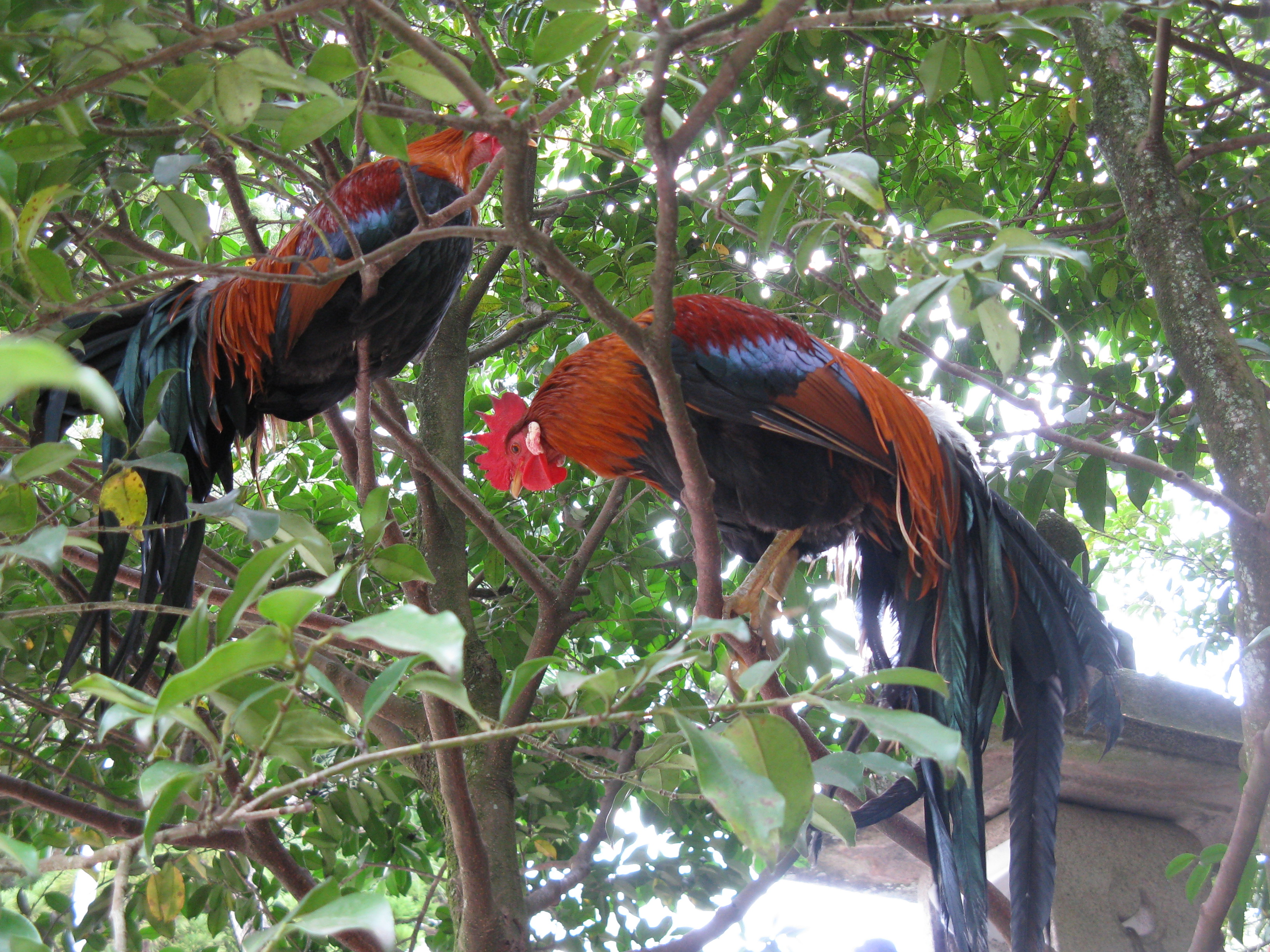 石上神宮 霊鳥（チャボか？）